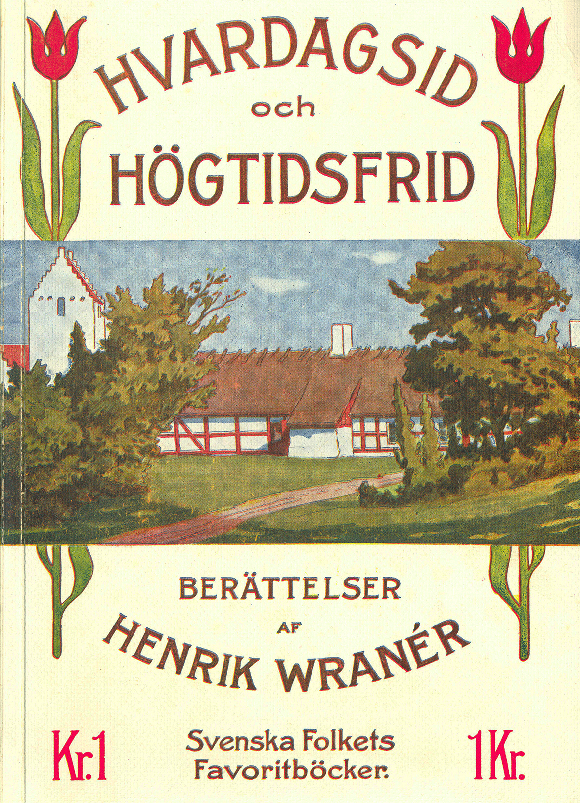 Cover of Hvardagsid och högtidsfrid by Henrik Wranér